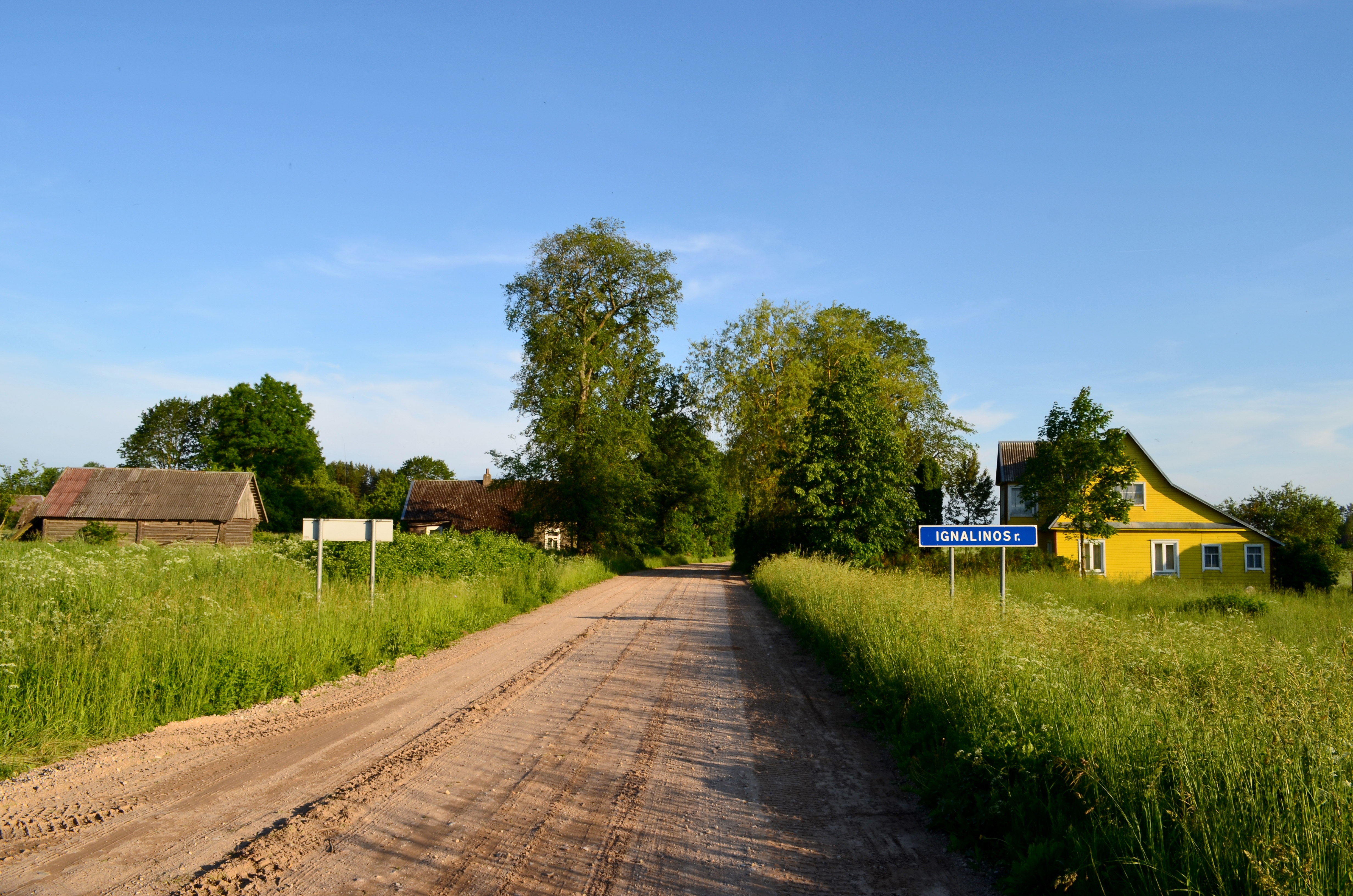 Tolimėnai, Ignalinos r.